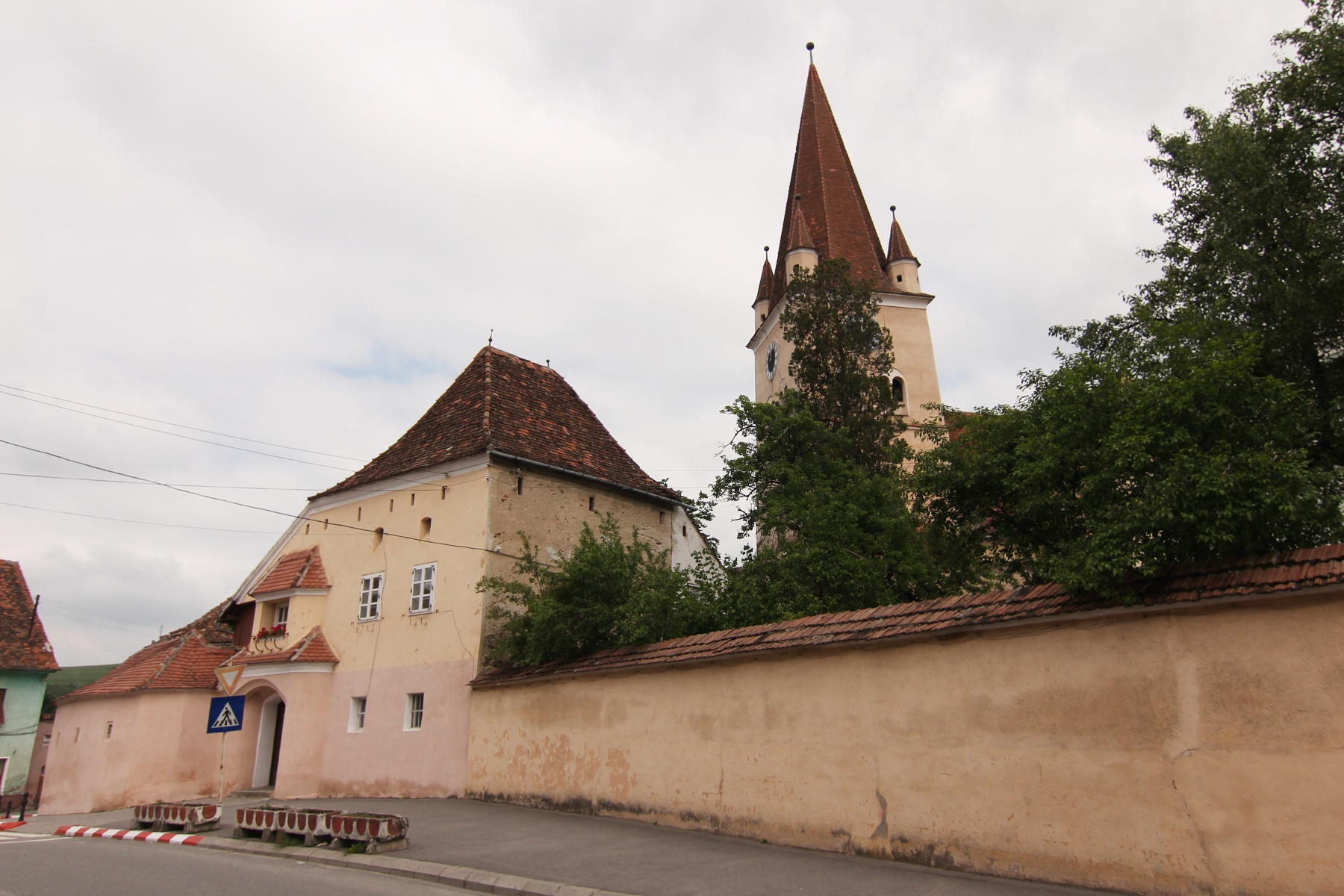 Incintă fortificată exterioară, cu turnuri, bastioane, capelă, zwinger, casă parohială 03